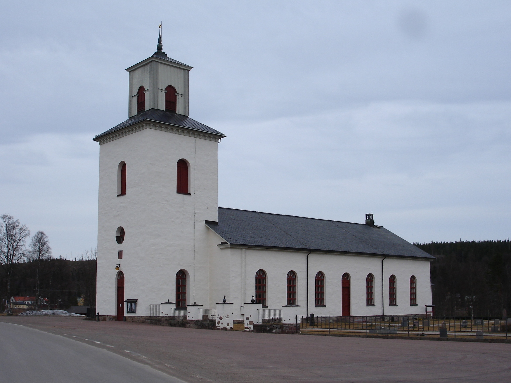 Transtrands kyrka i Dalarna